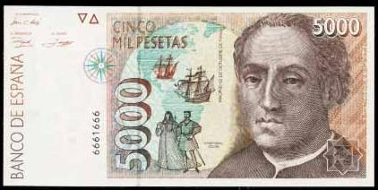 5000 pesetas del 92.